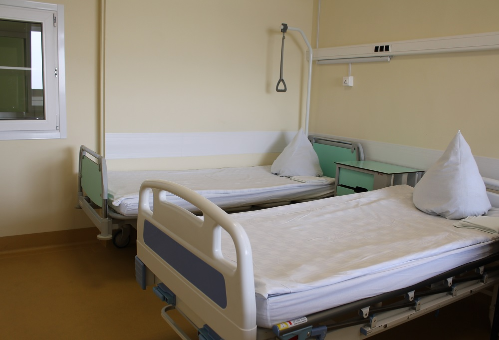 Фото боксированной палаты ИКБ № 2